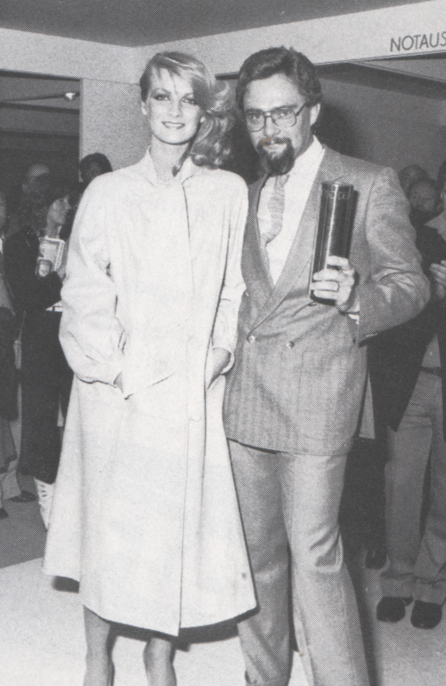 32. Modellwettbewerb des Kürschnerhandwerks, Leistungsschau, Siegerehrung. Auf dem Frankfurter Messegelände, anlässlich der Internationale Pelzmesse Frankfurt am Main. Kürschnermeister Bisegger aus Krefeld mit in der Gruppe „Vielseitige Tagespelze“ prämiertem Mantel .